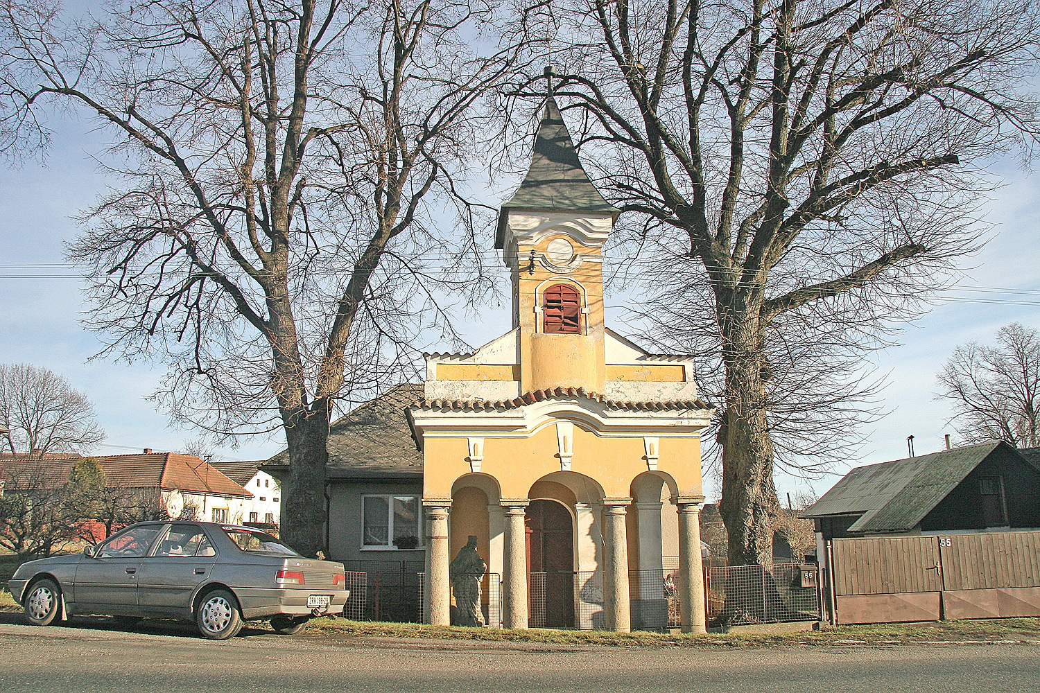 Kaple svatého Jana Nepomuckého v obci Kámen, district Havlíčkův Brod